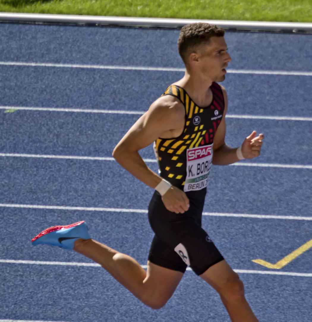 EKB10632 kevin borlée reeksen